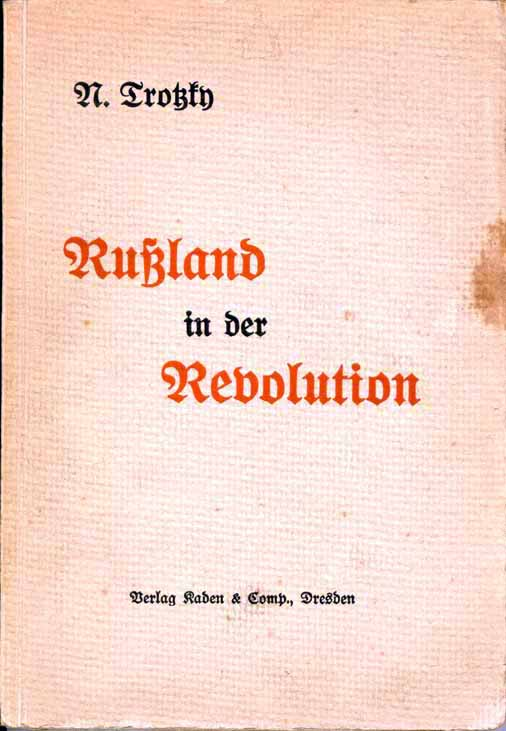 Trotzki L. Russland in der Revolution. — Dresden: Buch Druck und Verlag von Kaden & Comp., 1909. — 318 p.